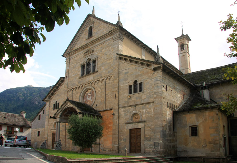 Chiesa parrocchiale di Santa Maria Assunta a Montecrestese (VB)